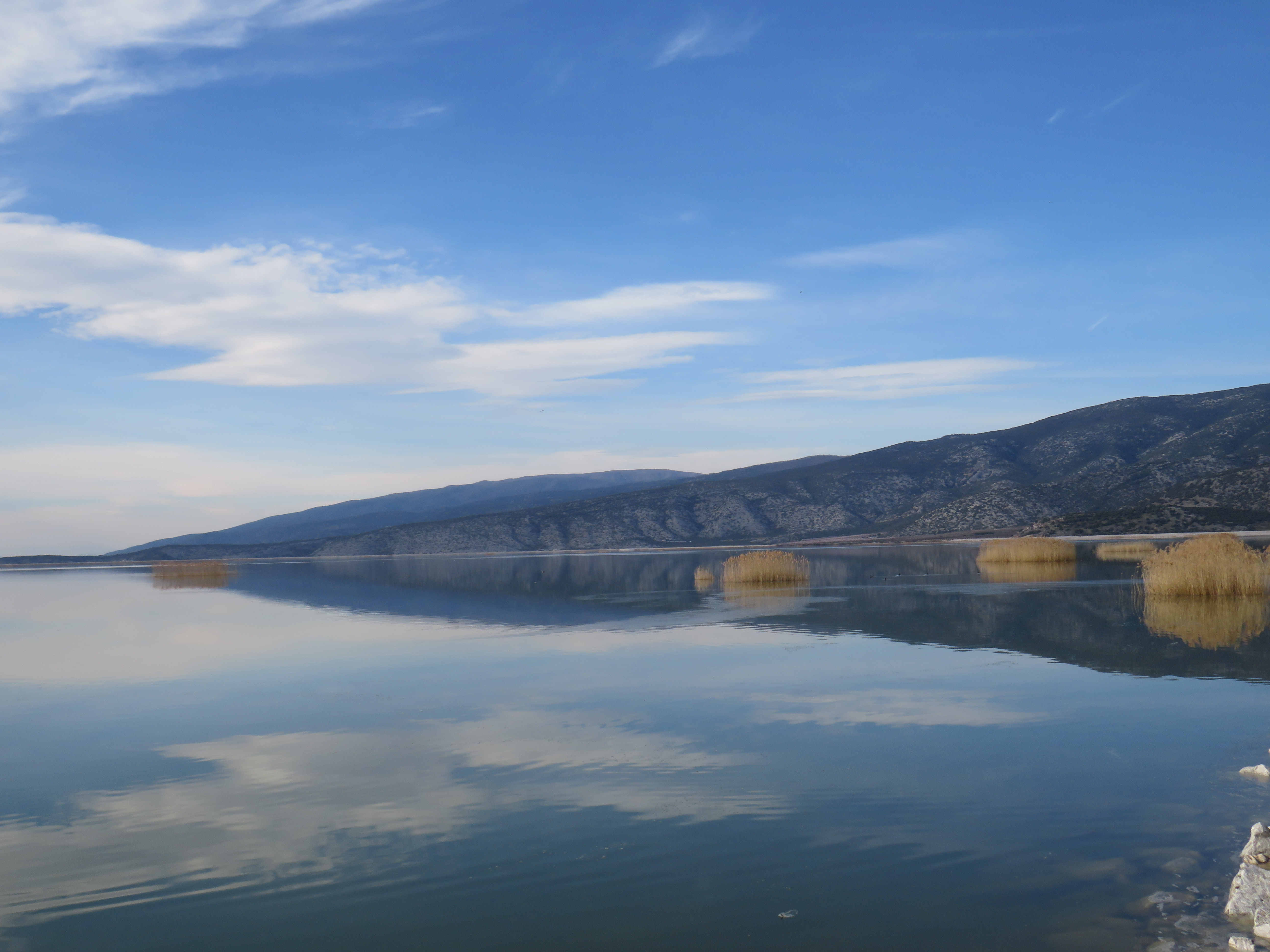 Η λίμνη απ το νότιο φράγμα, κοντά στο χωριό Κανάλια.